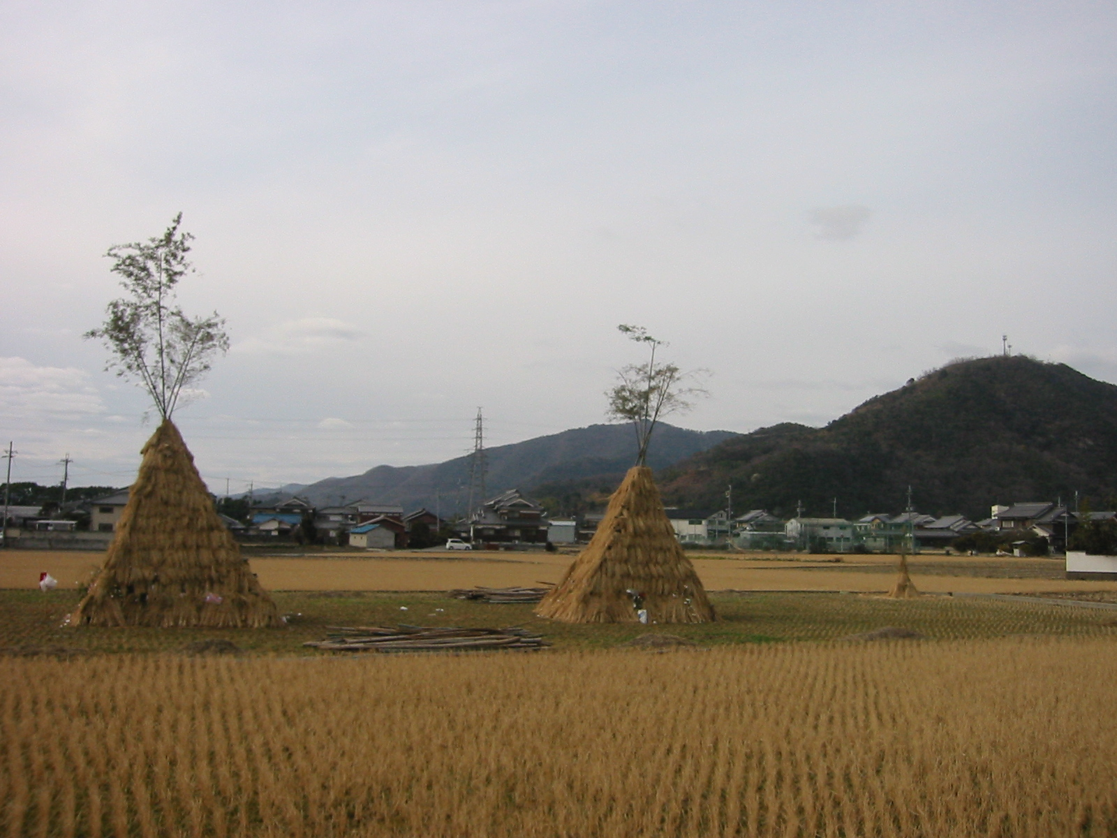 どんと 兵庫県たつの市にて